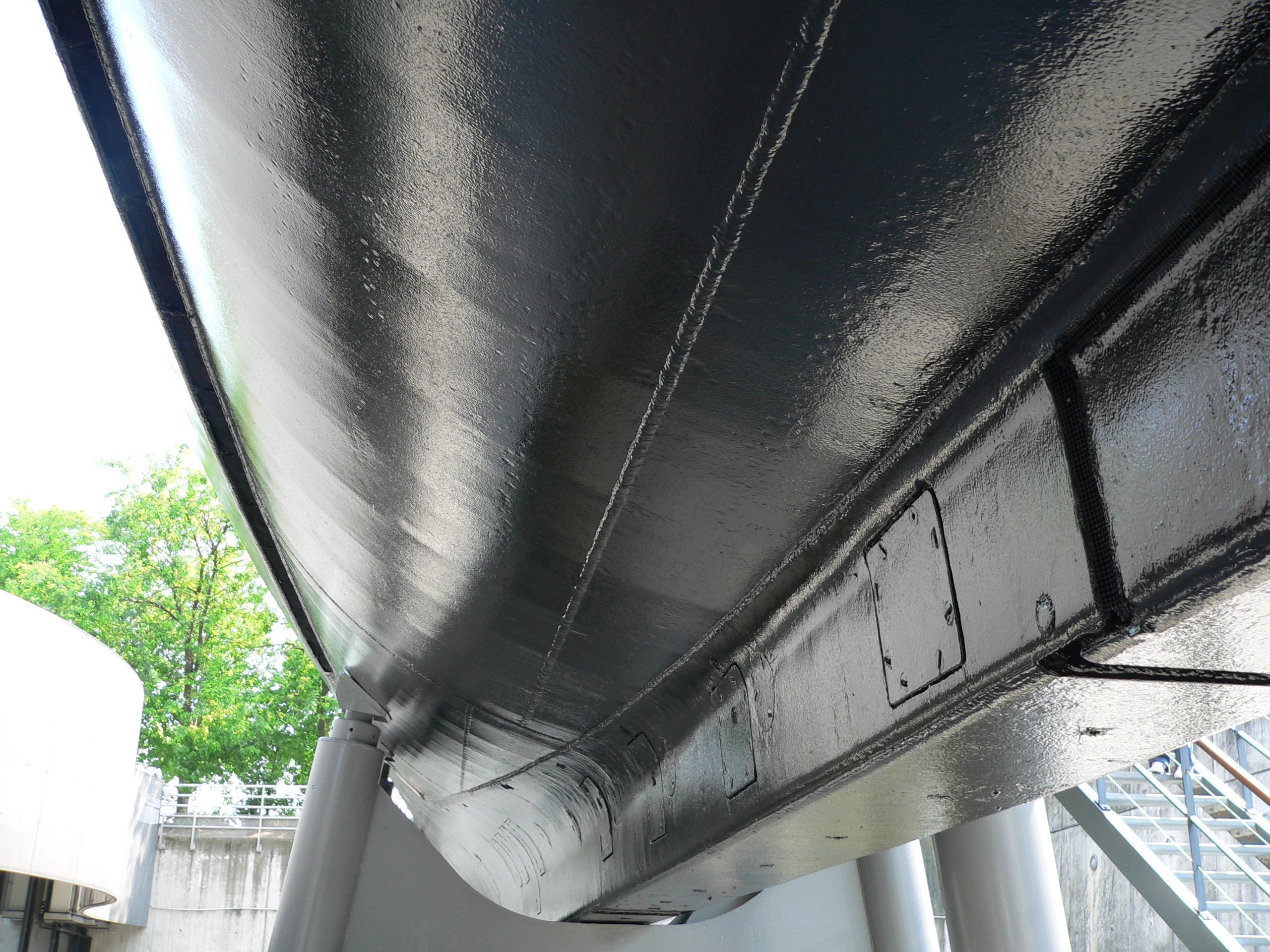 Argonaute